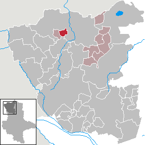 (Original text: Steinitz im Landkreis Salzwedel)